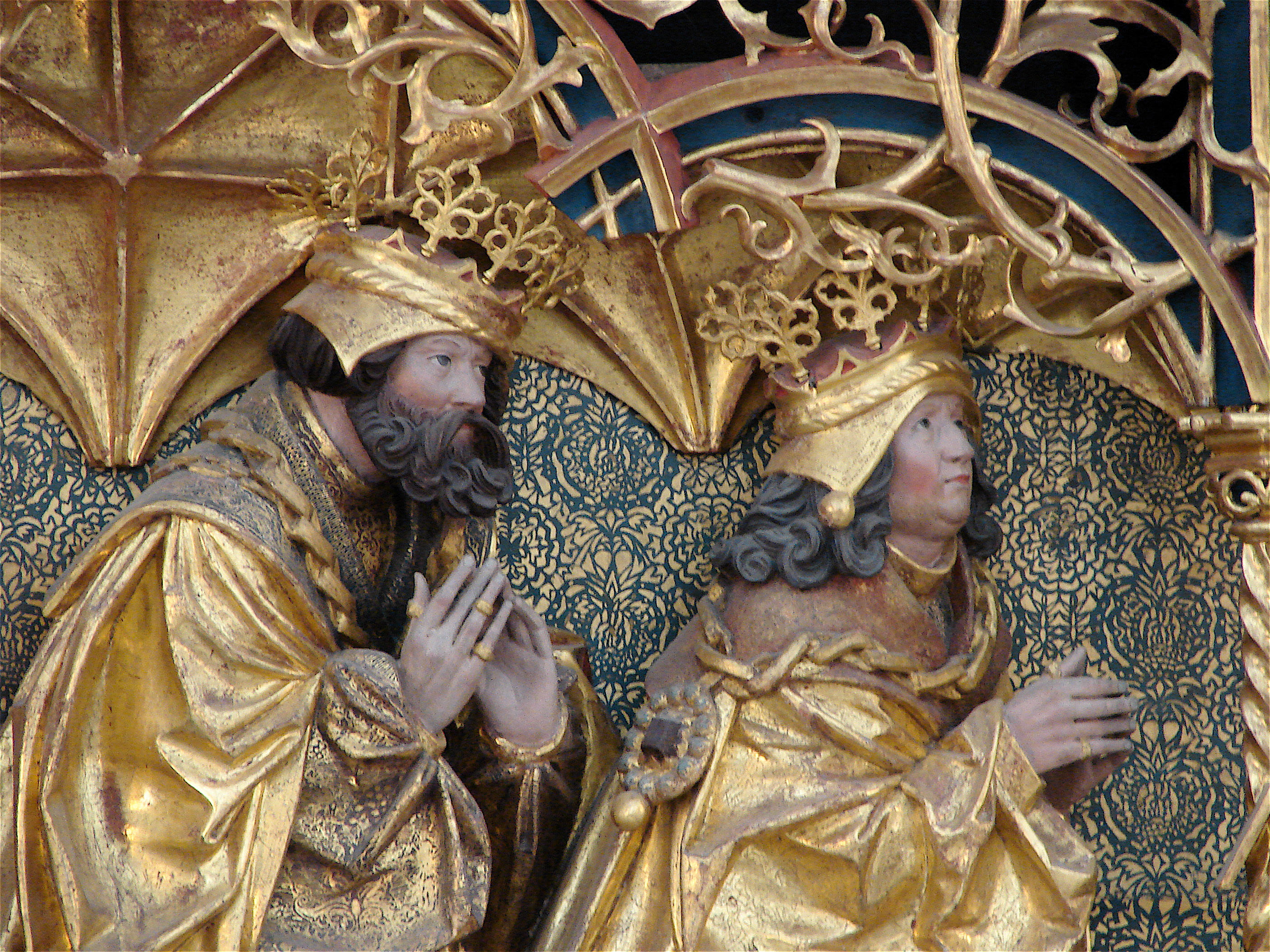 Detalje av Claus Bergs altertavle i Odense domkirke Sankt Knuds, forestillende kong Hans til højre og Christian II til venstre.